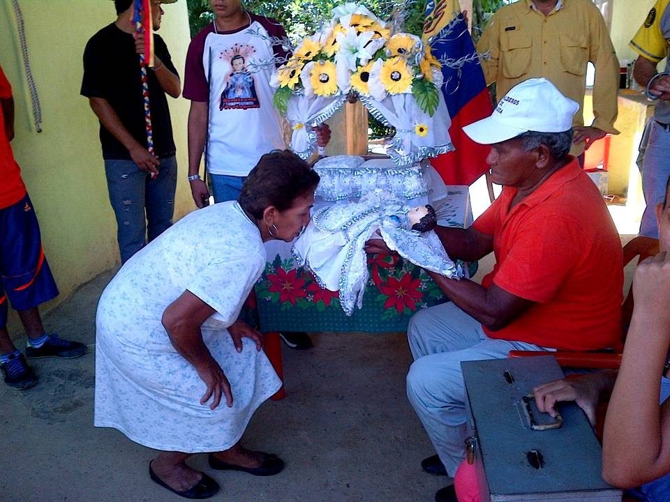 Al ser recibido en un hogar, el Niño Jesús de Caigua, "Pascualito", es venerado por todos los miembros de la familia que lo acoge con el acostumbrado beso de la efigie, en los pies,y manos,ademas con la imagen también bendicen a los presenten en el lugar, con la señal de la cruz